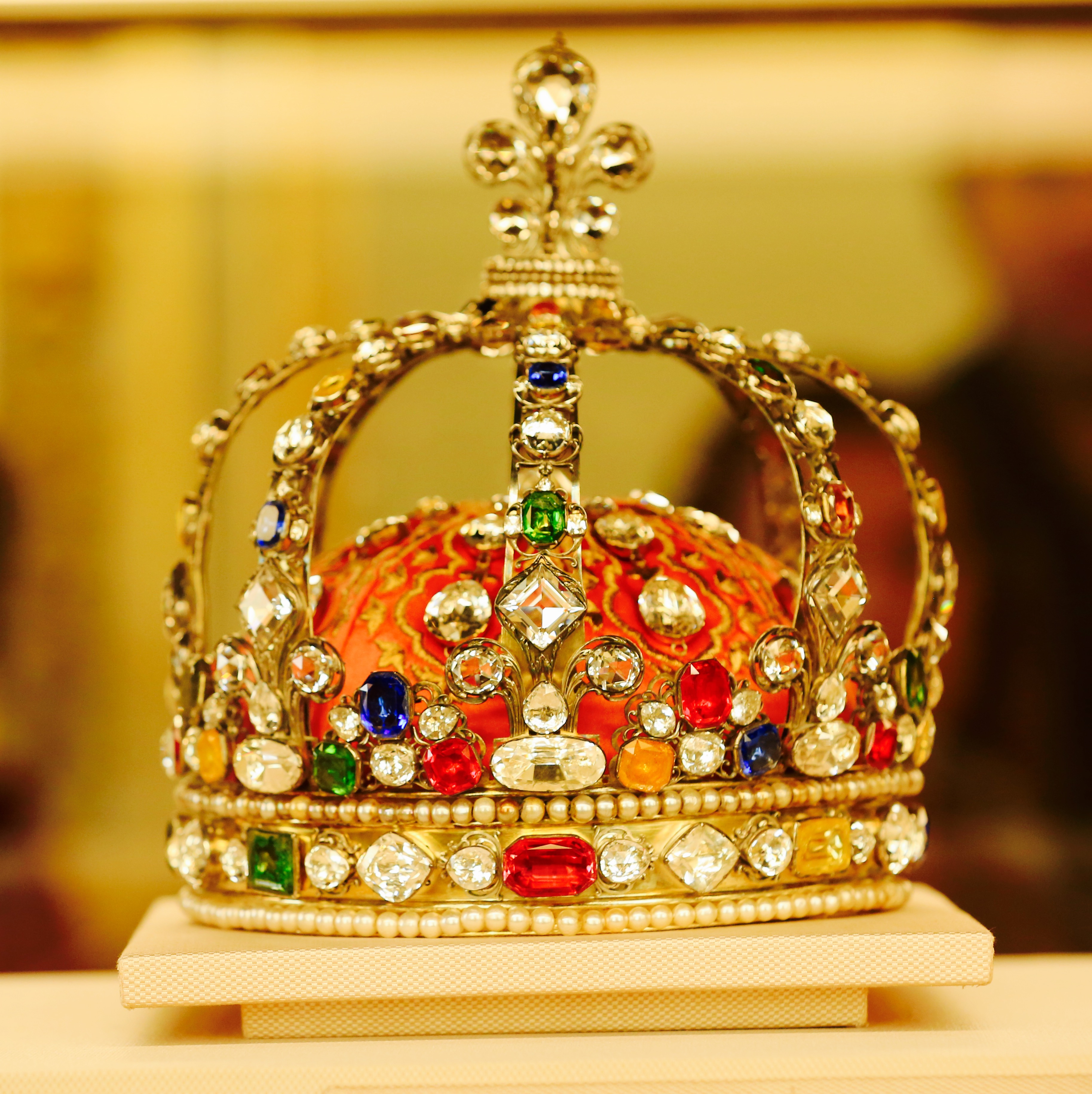 Crown of Louis XV, Musée du Louvre, Paris.